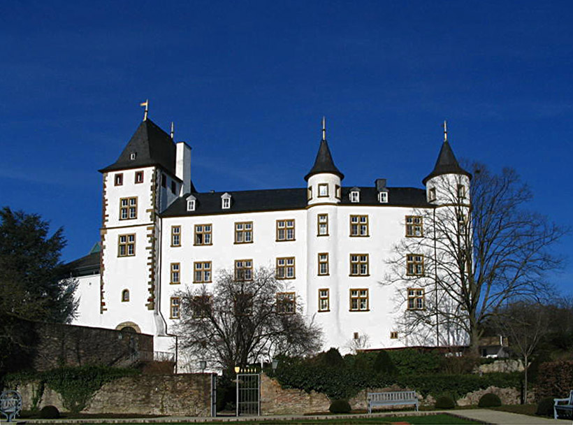 Schloss Berg Nennig Author: me Date: Mar. 2007